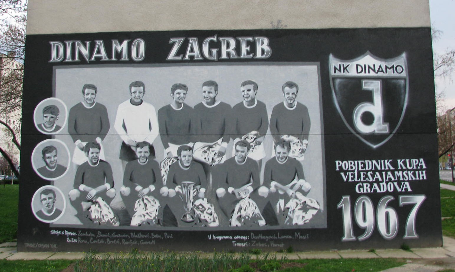 Grafit u zagrebačkoj Peščenici - NK Dinamo pobjednik Kupa velesajamskih gradova 1967.